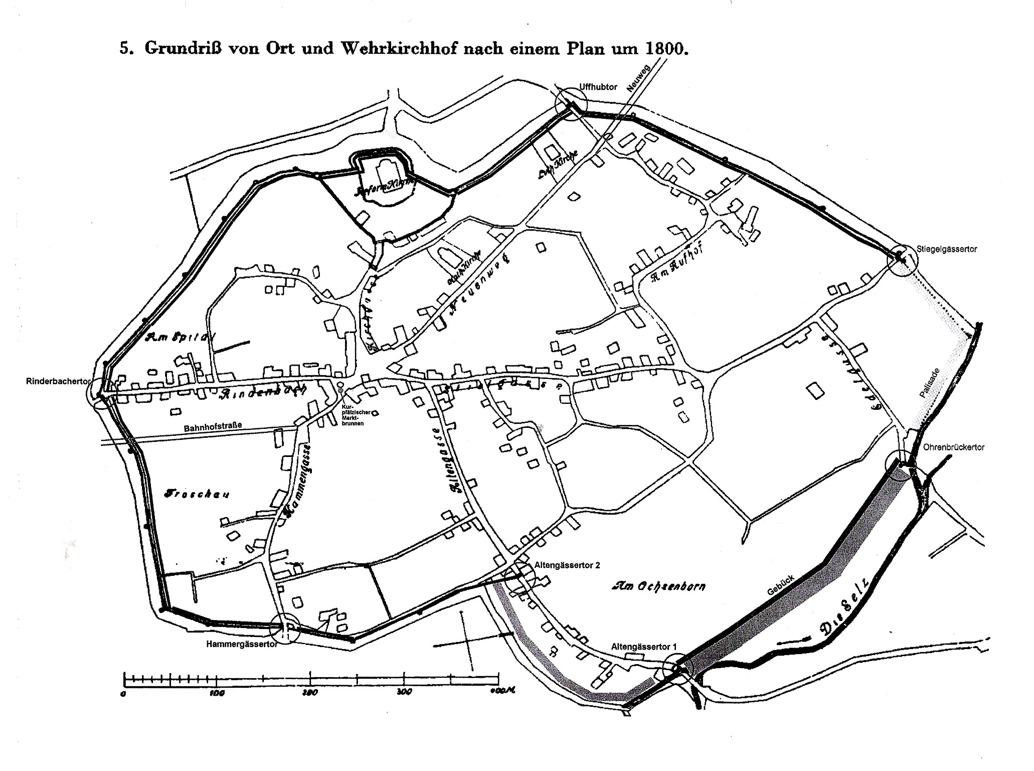 Stadtplan Ober-Ingelheims 1800: Foto: Historischer Verein Ingelheim e.V. Mit Bestätigung des Historischen Vereins Ingelheims. Danke nochmal an dieser Stelle.